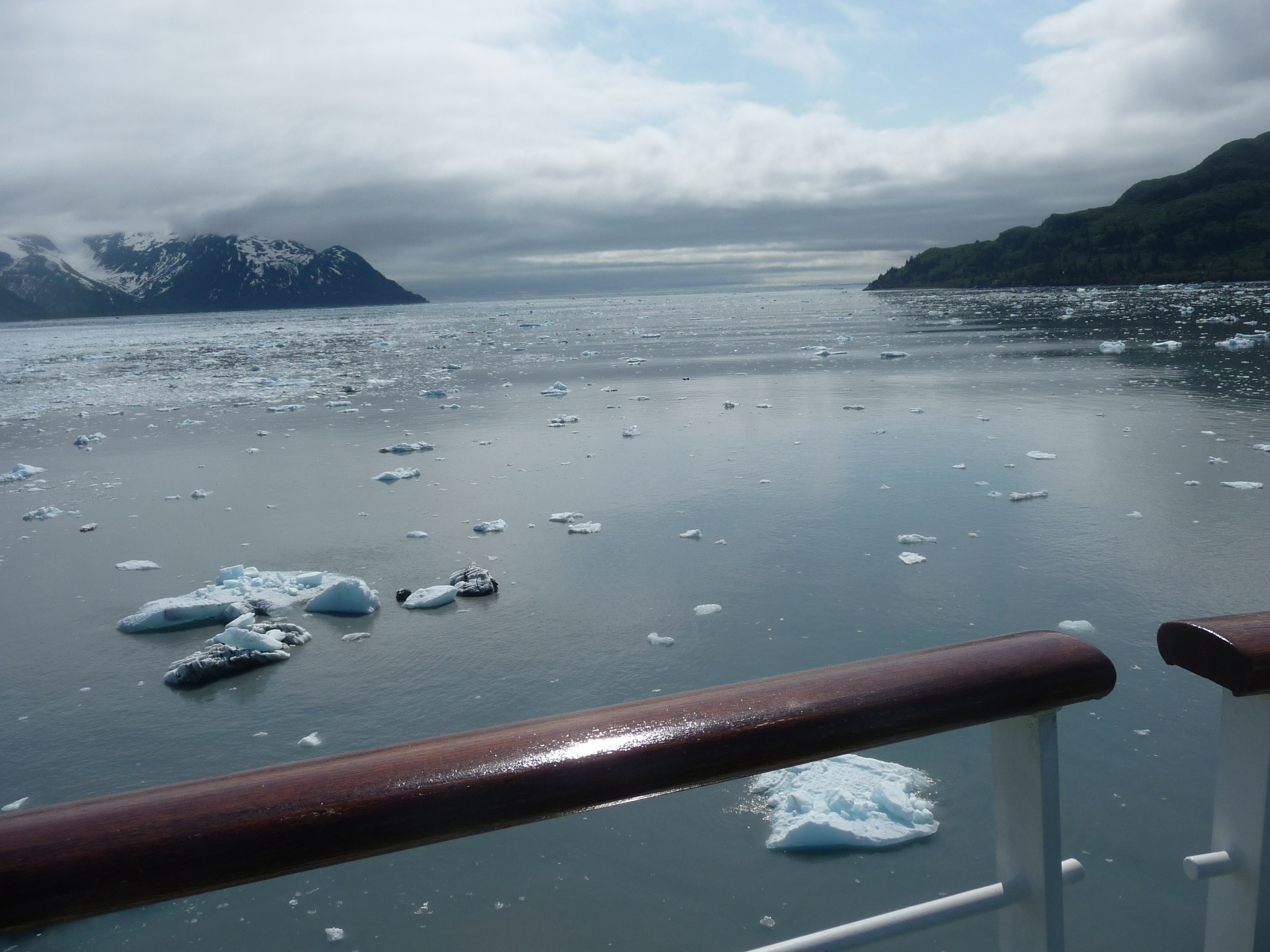 Icebergs in the Yakutat Bay, Alaska